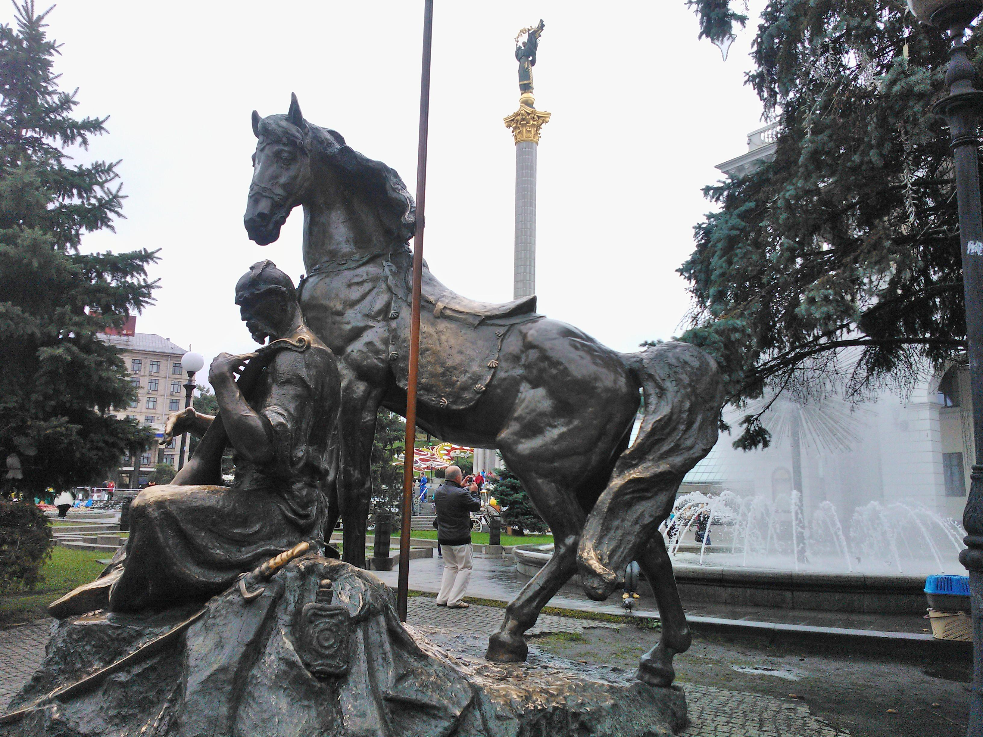 Пам'ятник козакові Мамаю. На задньому плані — монумент Незалежності (пам'ятка культурної спадщини)